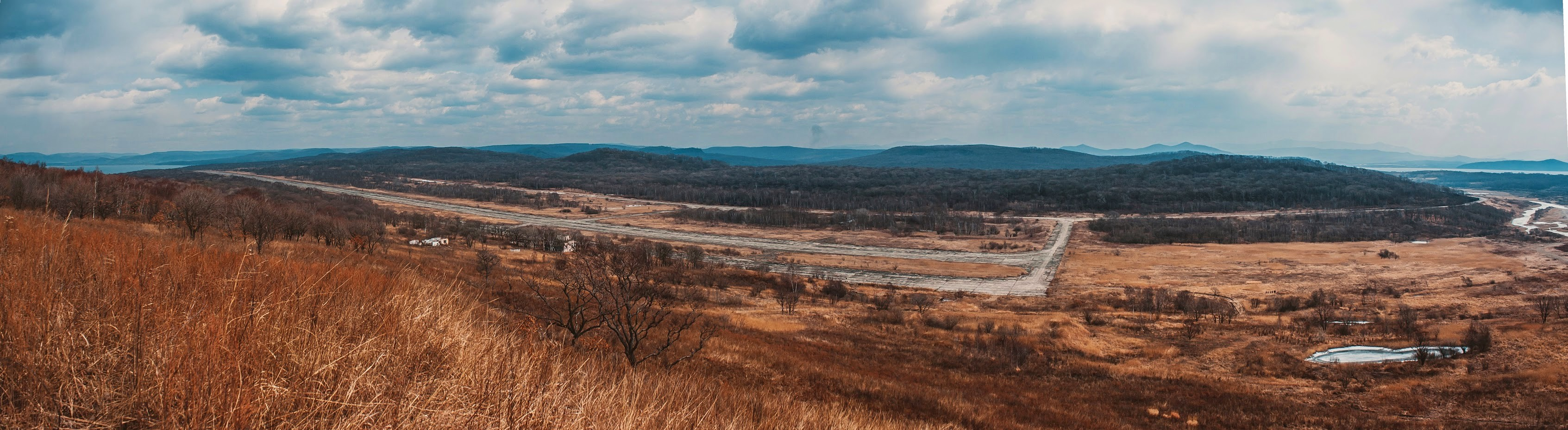 Ныне заброшенный аэродром Пристань в Шкотовском районе